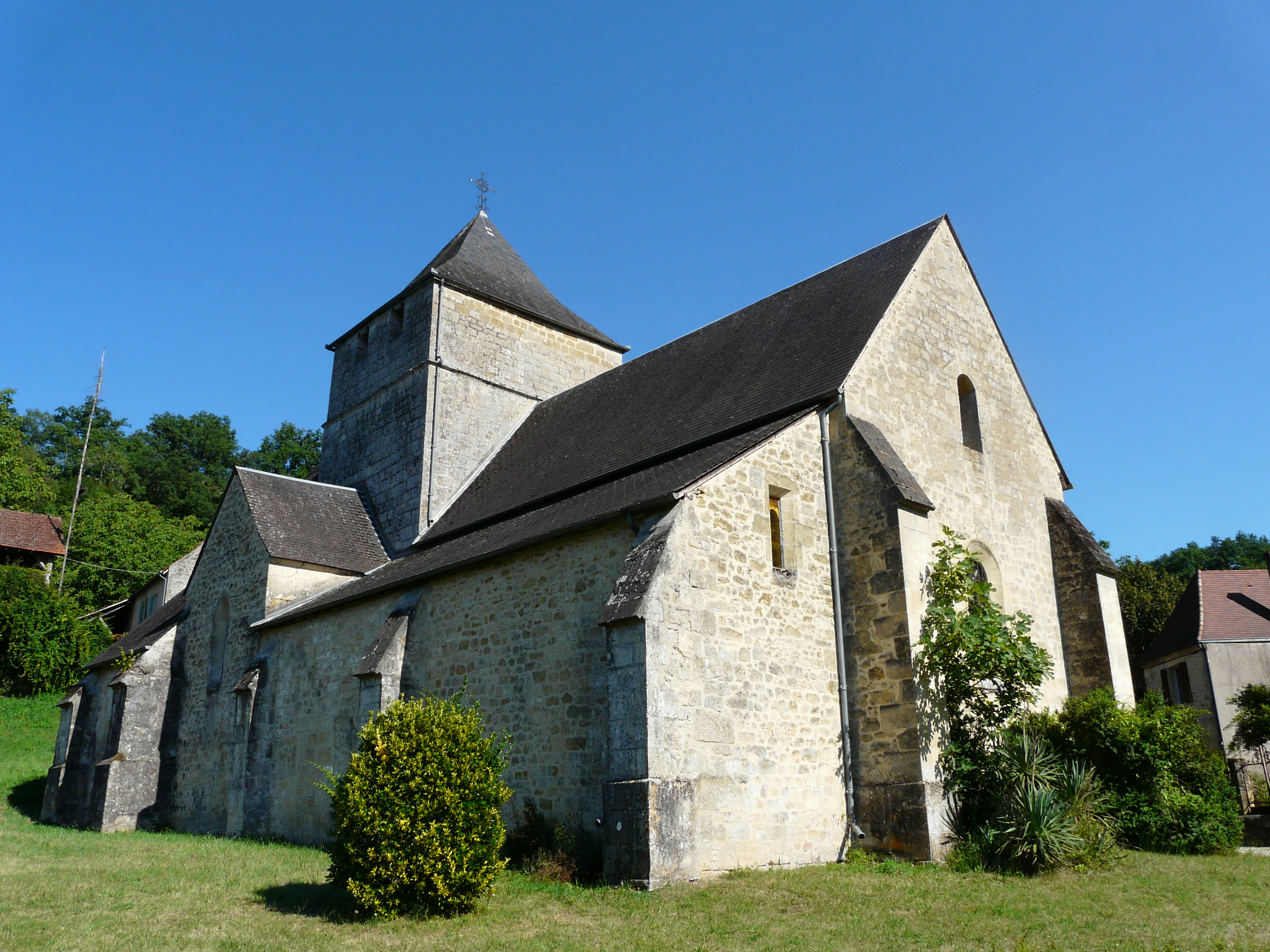 L'église Sainte-Mondane vue du nord-ouest, Sainte-Mondane, Dordogne, France.